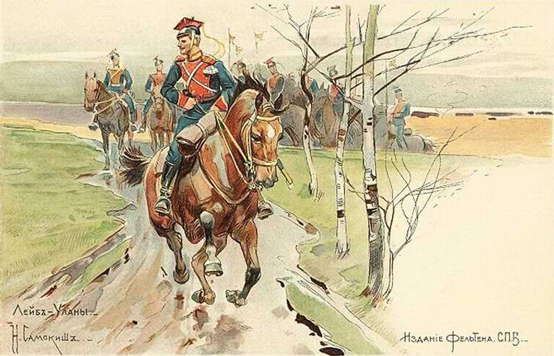 N. Samokiche. Лейб-Уланы. Издание Фельтена. С.П.Б.